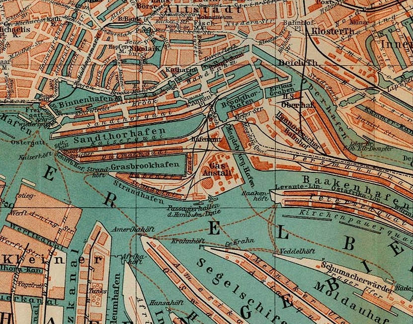 Karte Hamburger Hafen 1910 (Ausschnitt)